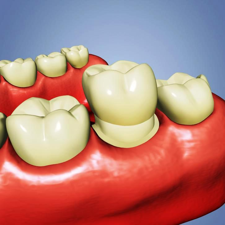 Nasazení finální zubní korunky